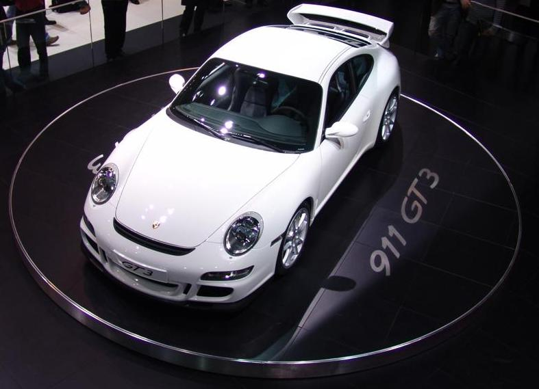 Porsche 911 GT3 (997) Geneva 2006Porsche 911 GT3 997 Geneva 2006